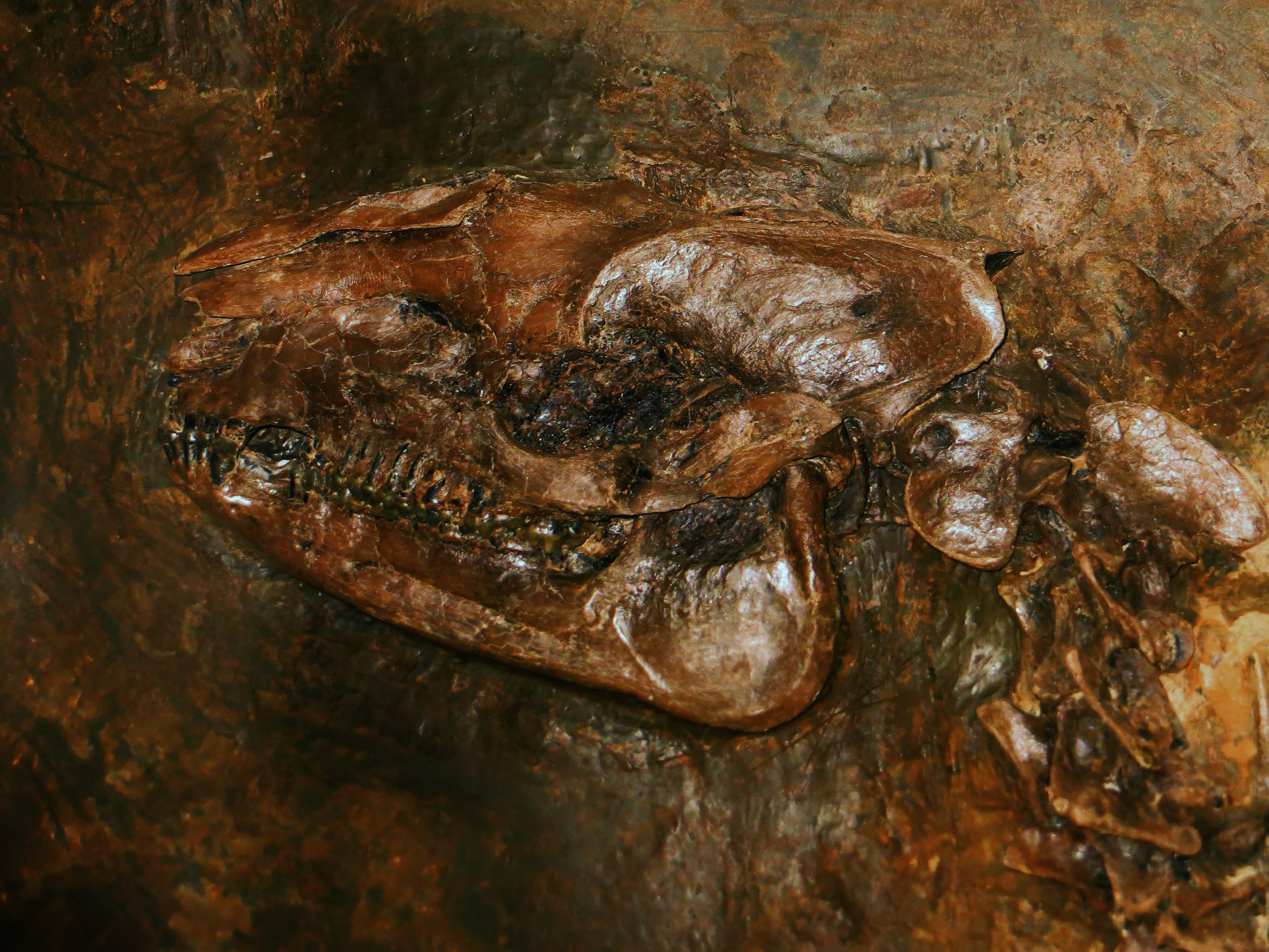 Took the picture at Senckenberg Museum, Frankfurt